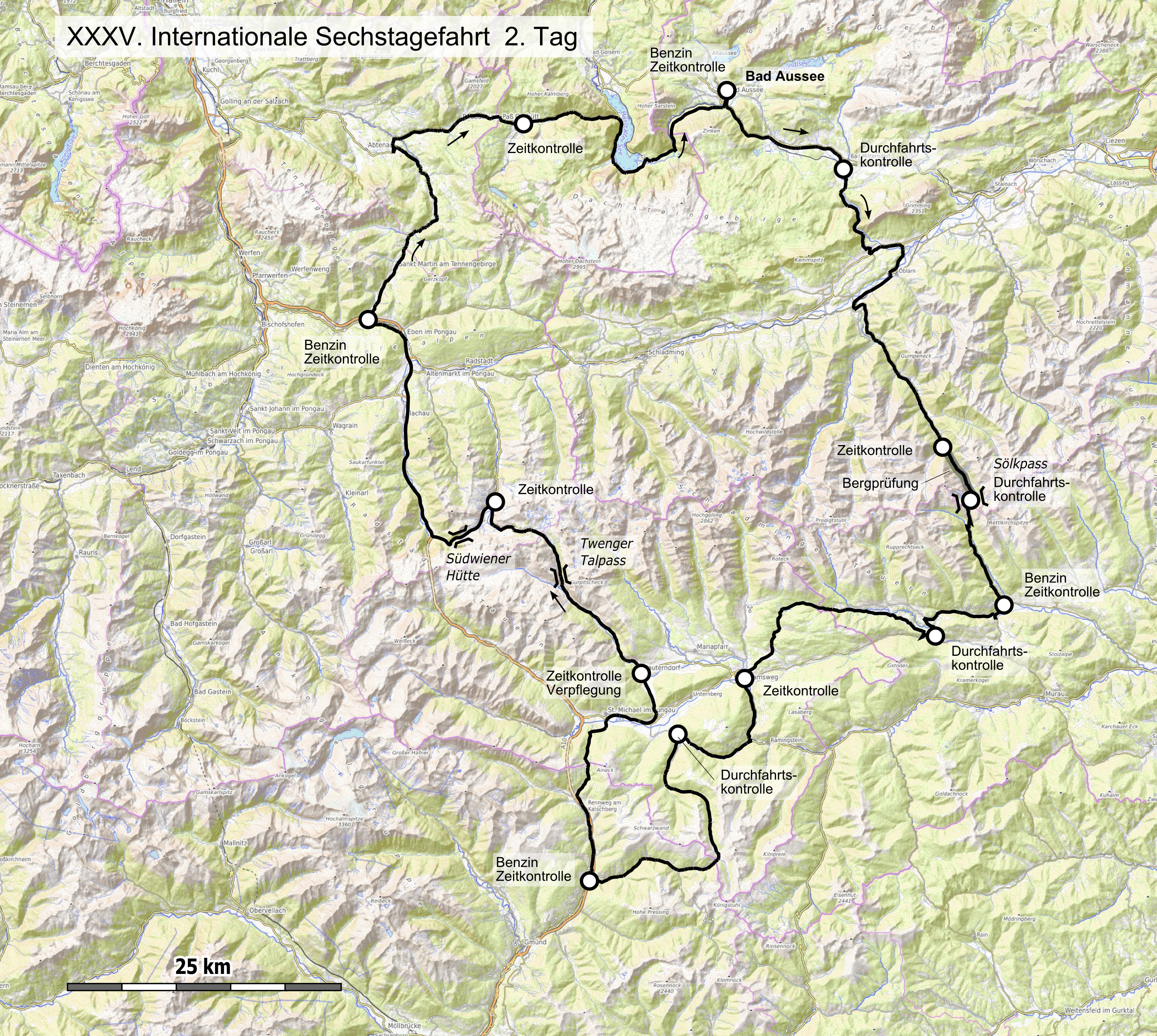 Karte der 35. Internationale Sechstagefahrt, Route des 2. Tages